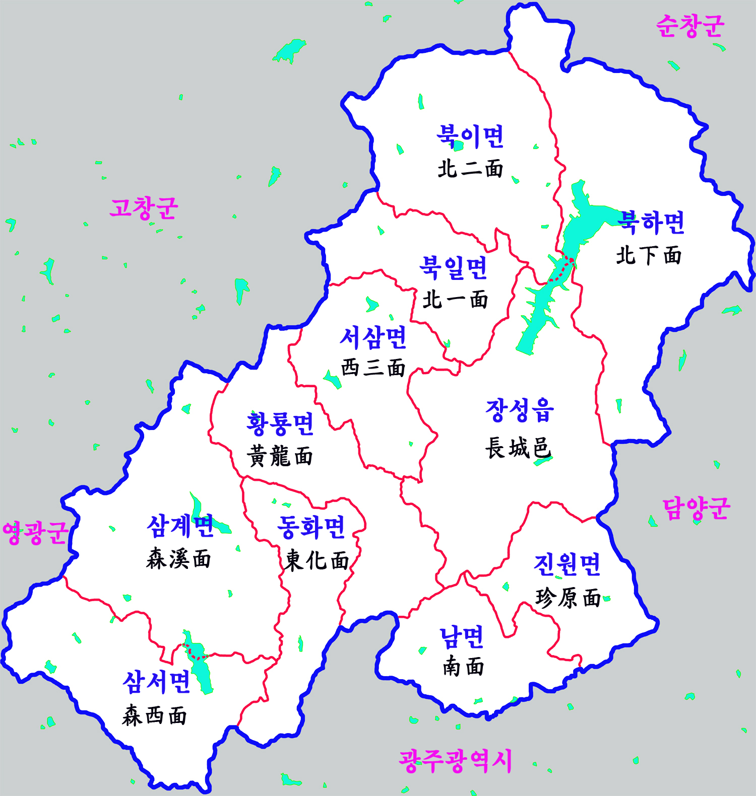 전남 장성군 행정구역도